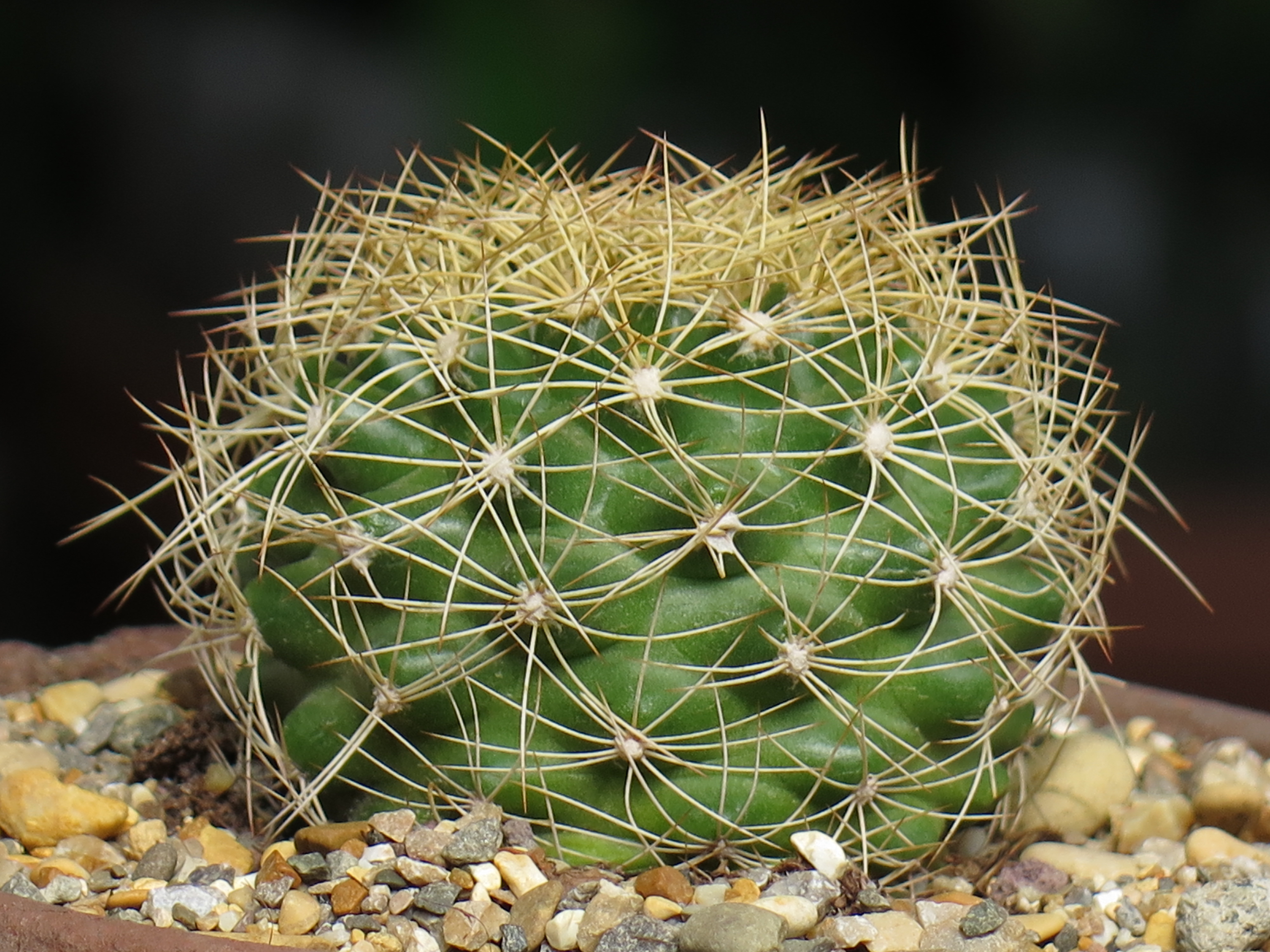 Discocactus araneispinus ssp. nova MH 736 (South Limoero, Bahia)